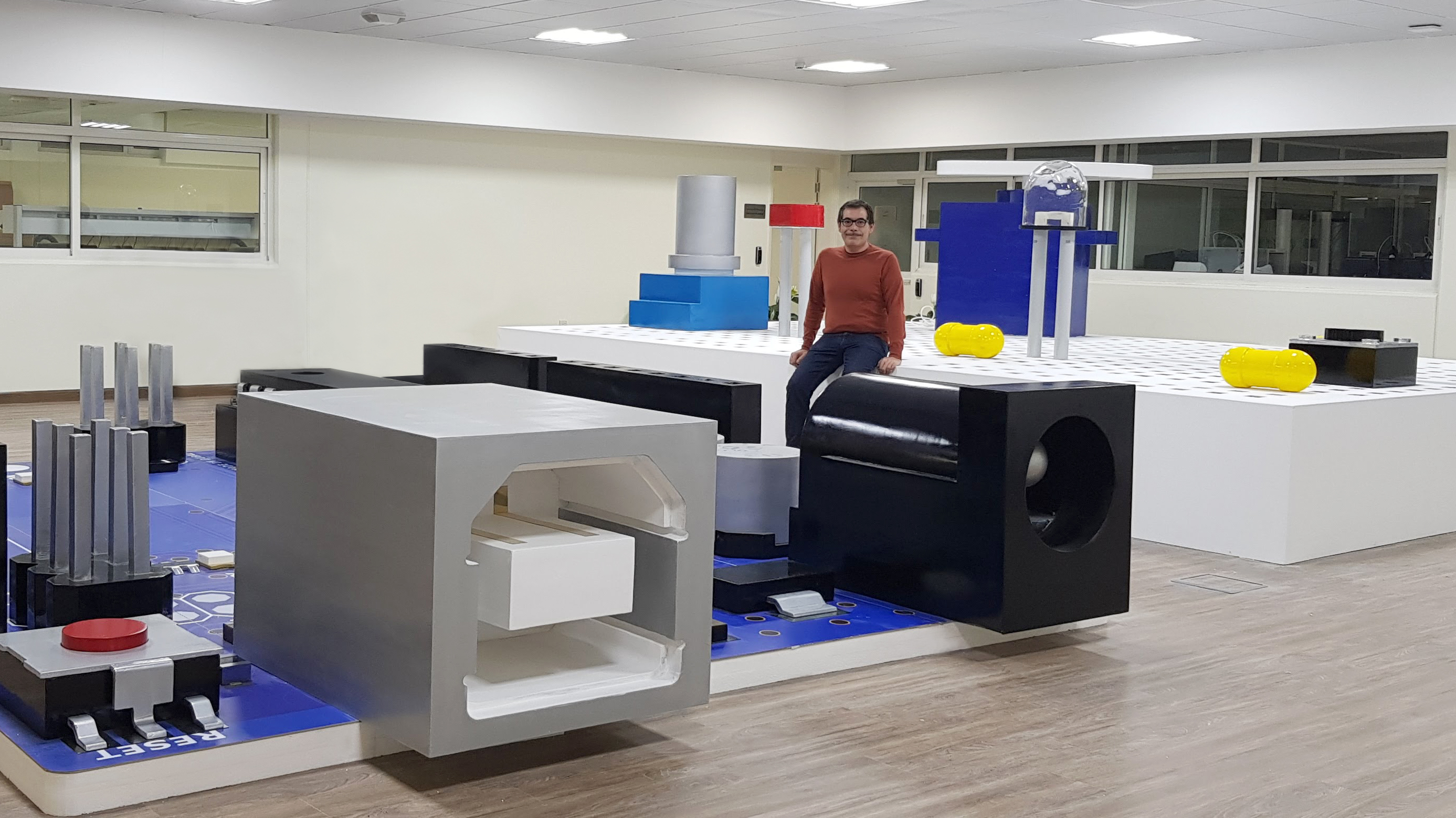 World's largest Arduino clone, Dubai 2017